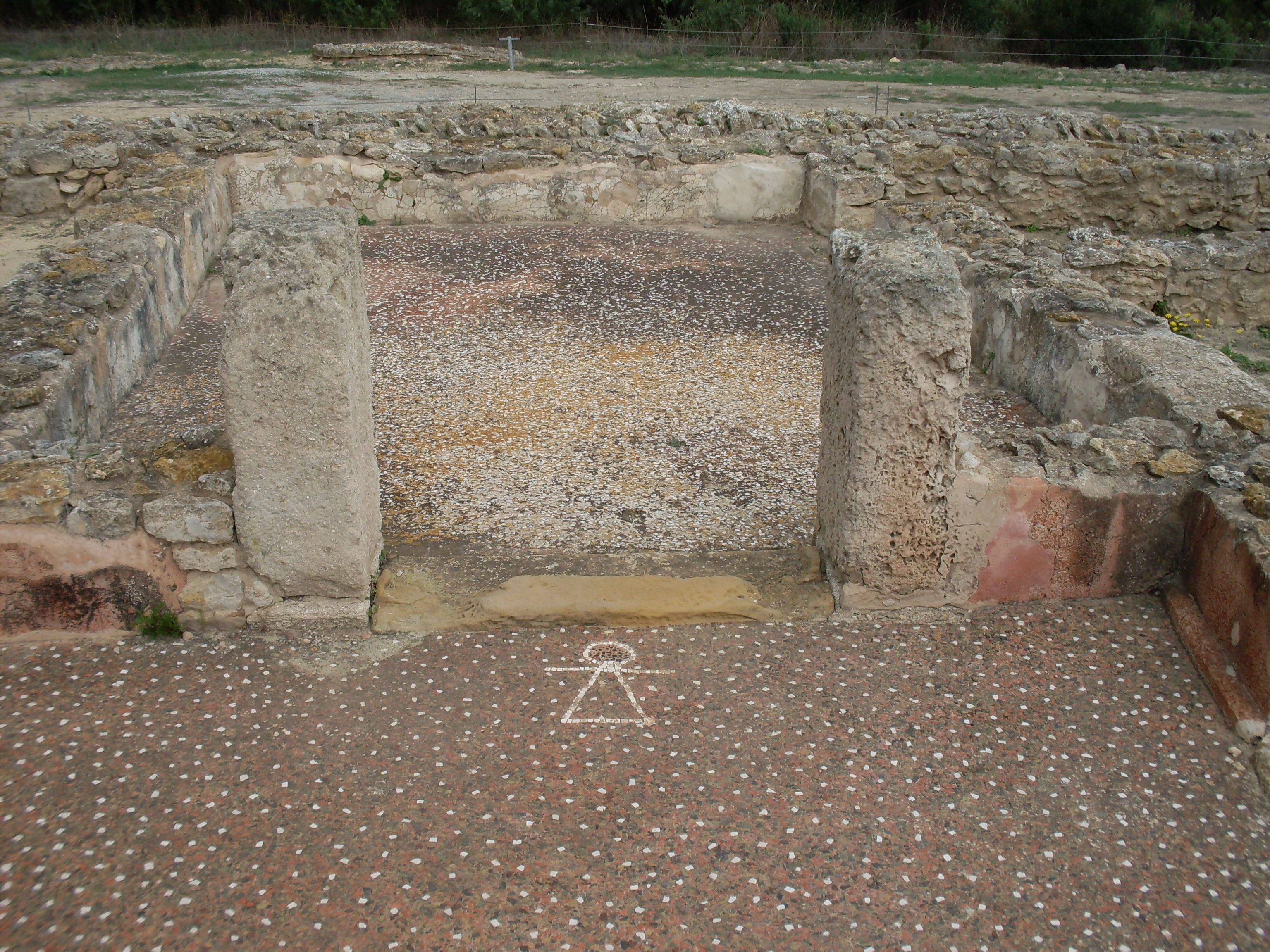 Pavement de mosaique avec le signe dit de Tanit